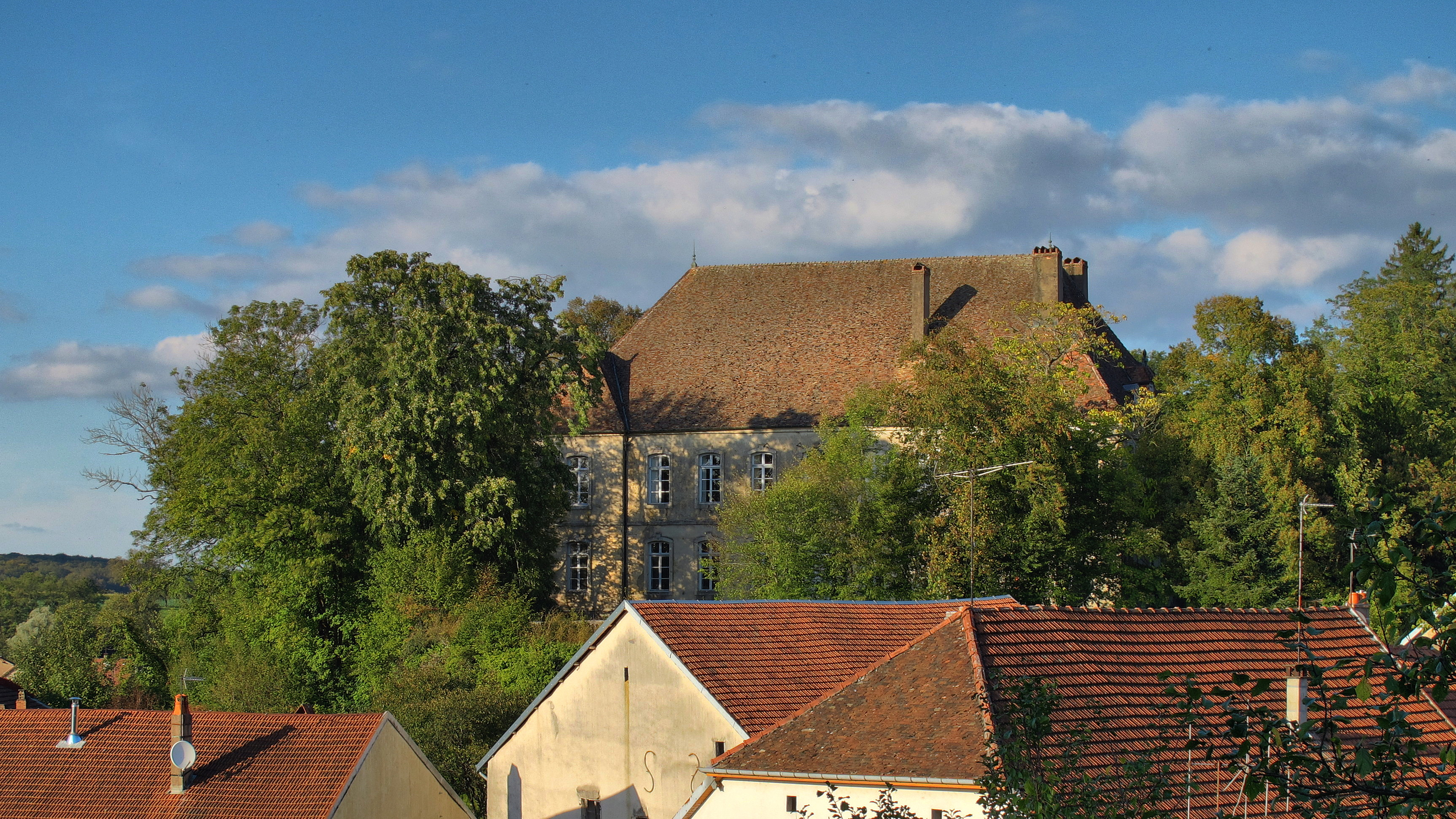 Château de Boult (Haute-Saône, France)